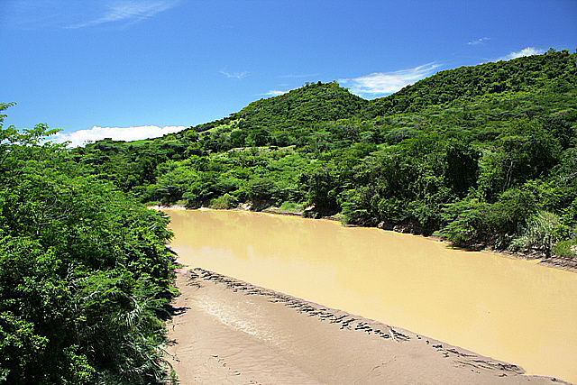 El río Tocuyo, aguas abajo de la población de Churuguara, constituye en este tramo la frontera natural entre los estados Lara y Falcón, en el occidente de Venezuela.